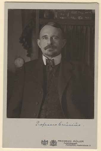 Porträt des Philologen Otto Crusius (1857-1918)